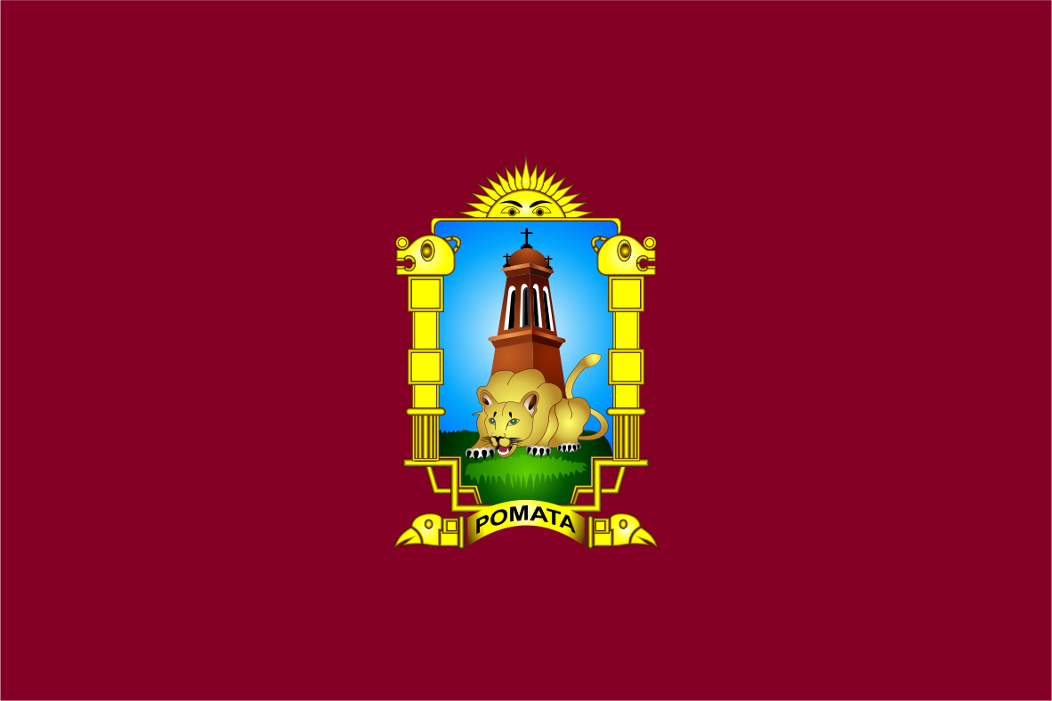 Distrito de Pomata - Provincia de Chucuito - Región Puno